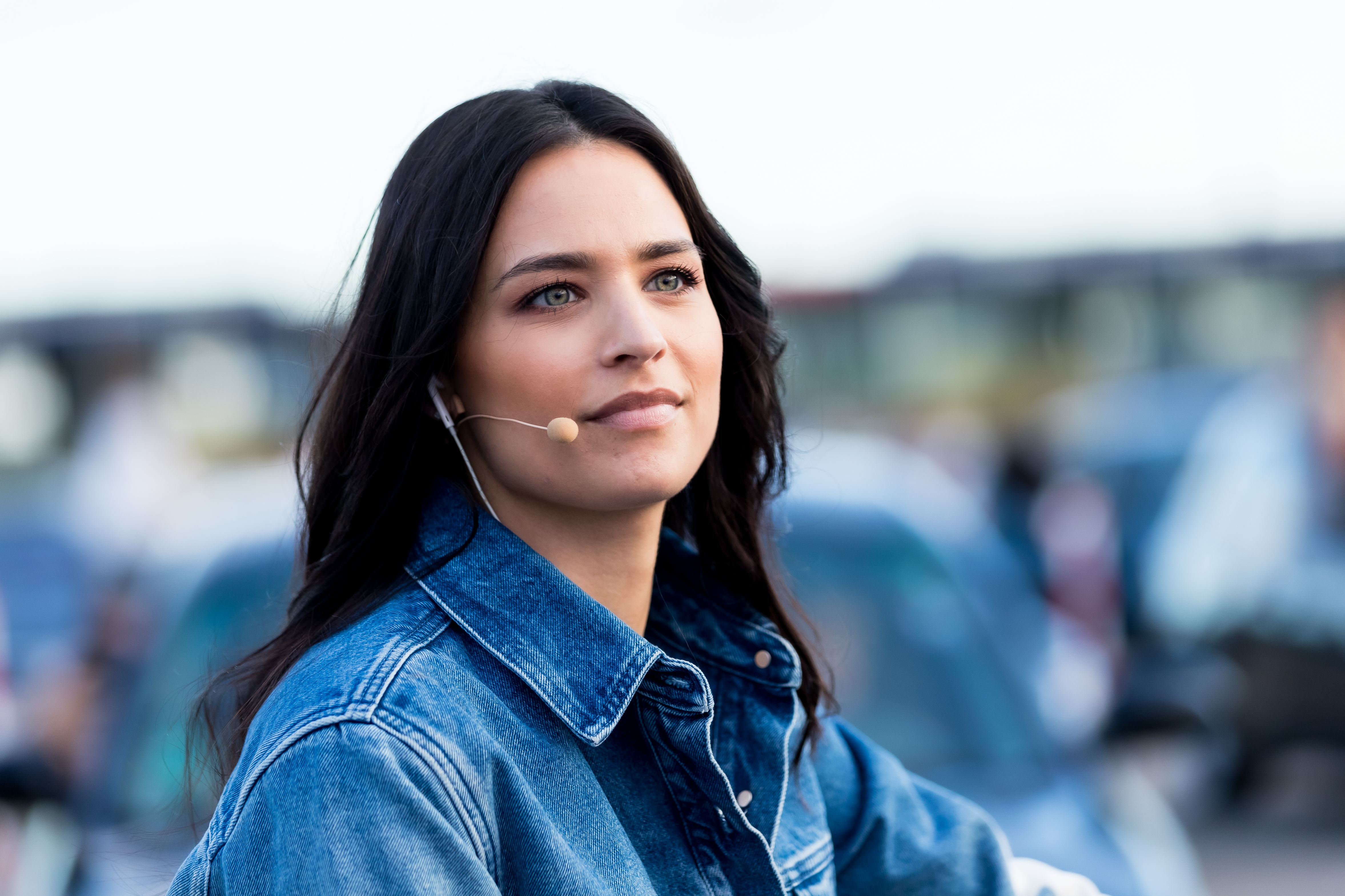 Die Pochers hier! during CARStival at Maimarktgelände, Mannheim, Baden-Württemberg, Germany on 2020-07-05, Photo: Sven Mandel Promotion: go7.ag